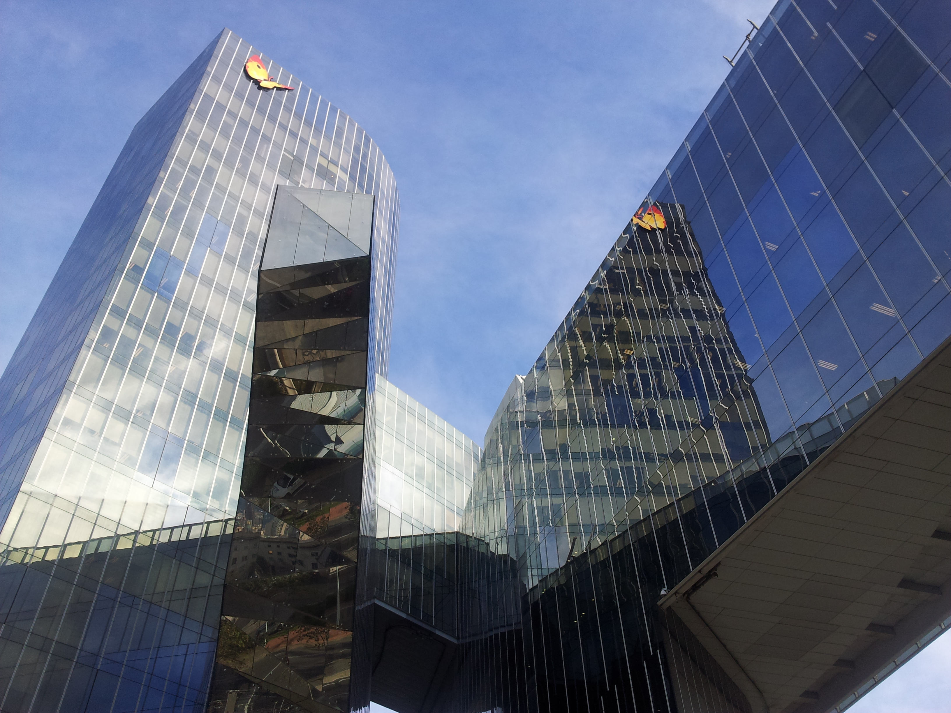 Edificio corporativo de Gas Natural Fenosa contruído sobre la antigua fábrica de gas de la Barceloneta (Barcelona)